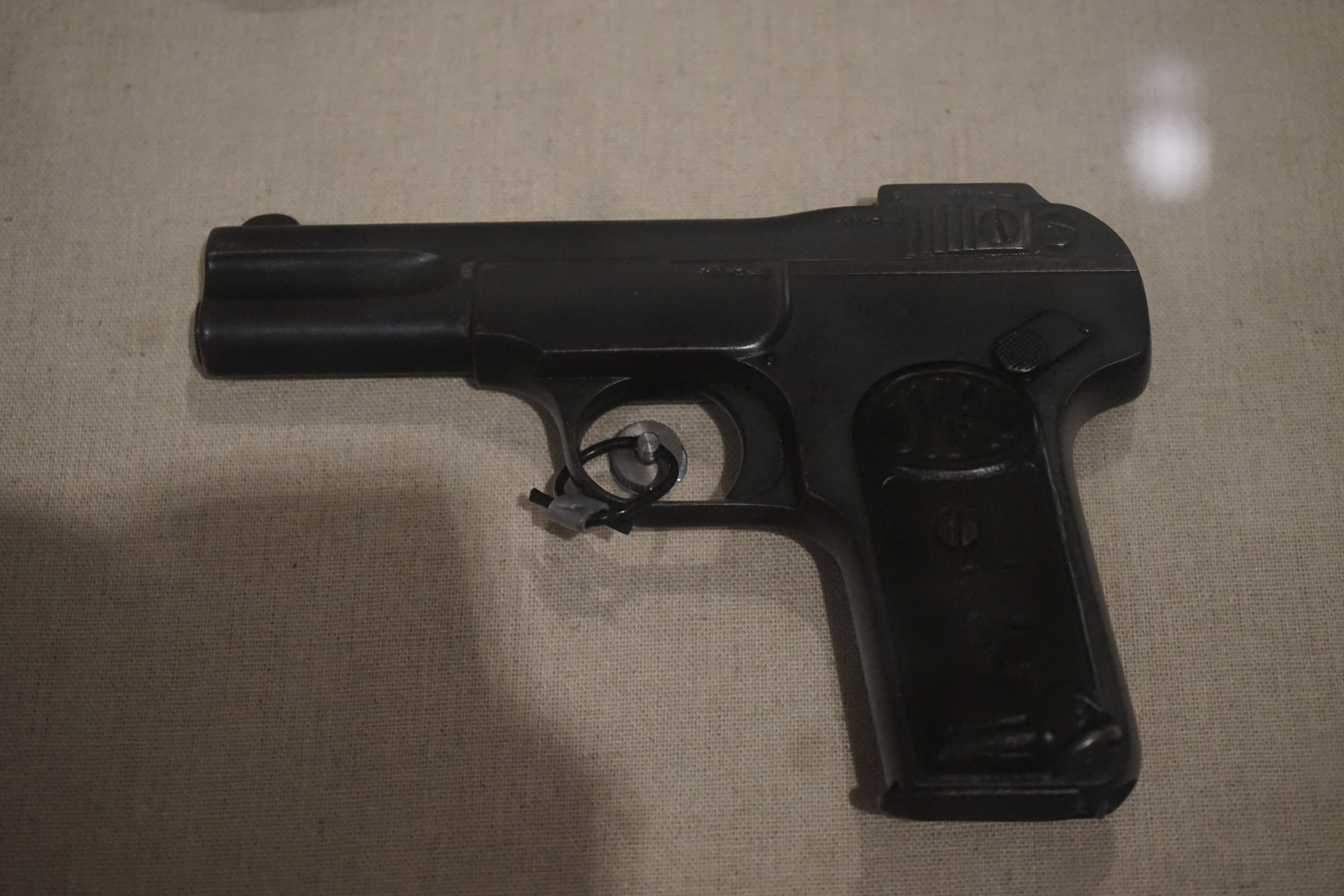 中文（中国大陆）: 济南战役中，解放军缴获国民党军第2绥靖区中将司令官王耀武的比利时造勃朗宁M1900式7.65毫米手枪。一级文物。